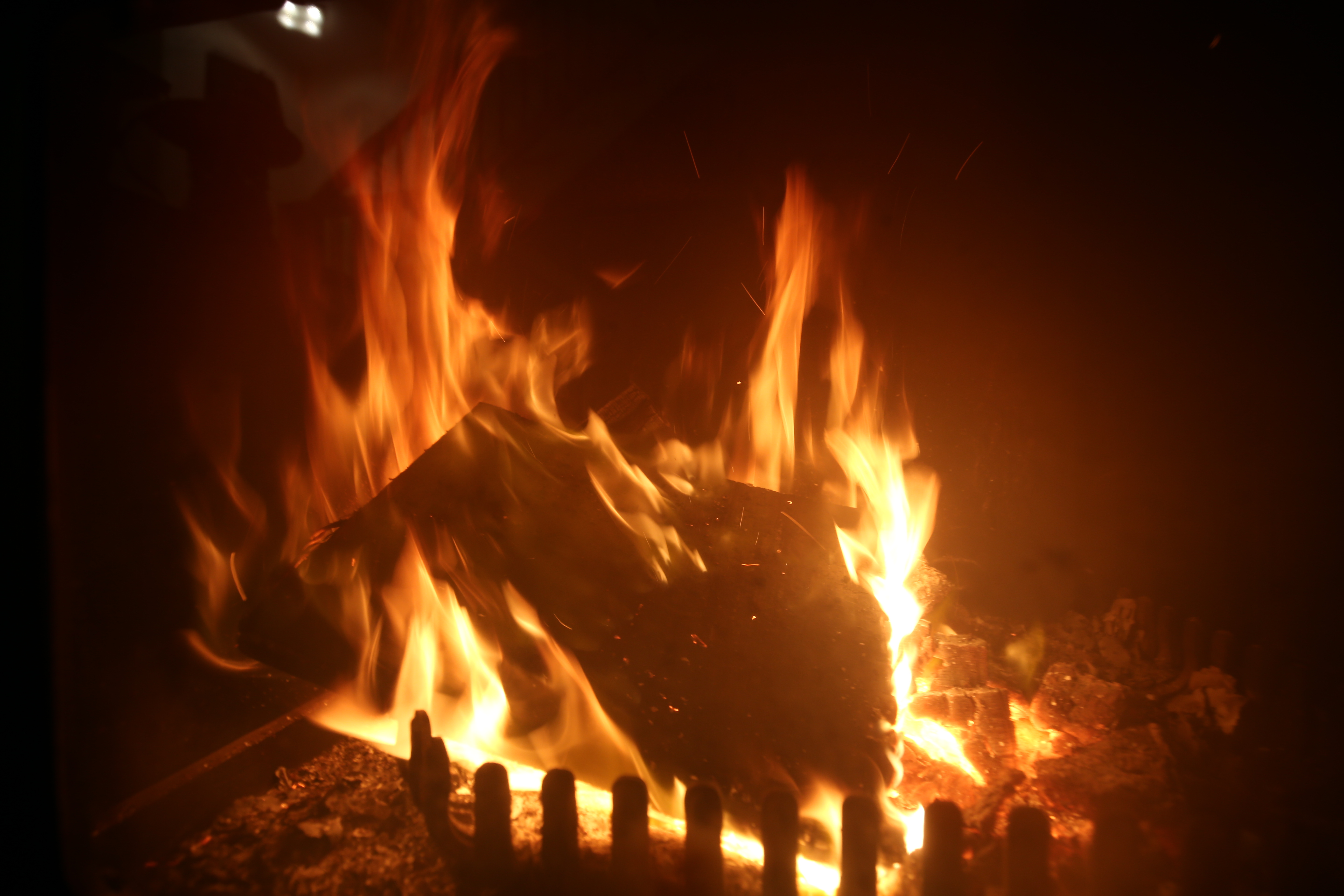 Brennendes Kaminfeuer